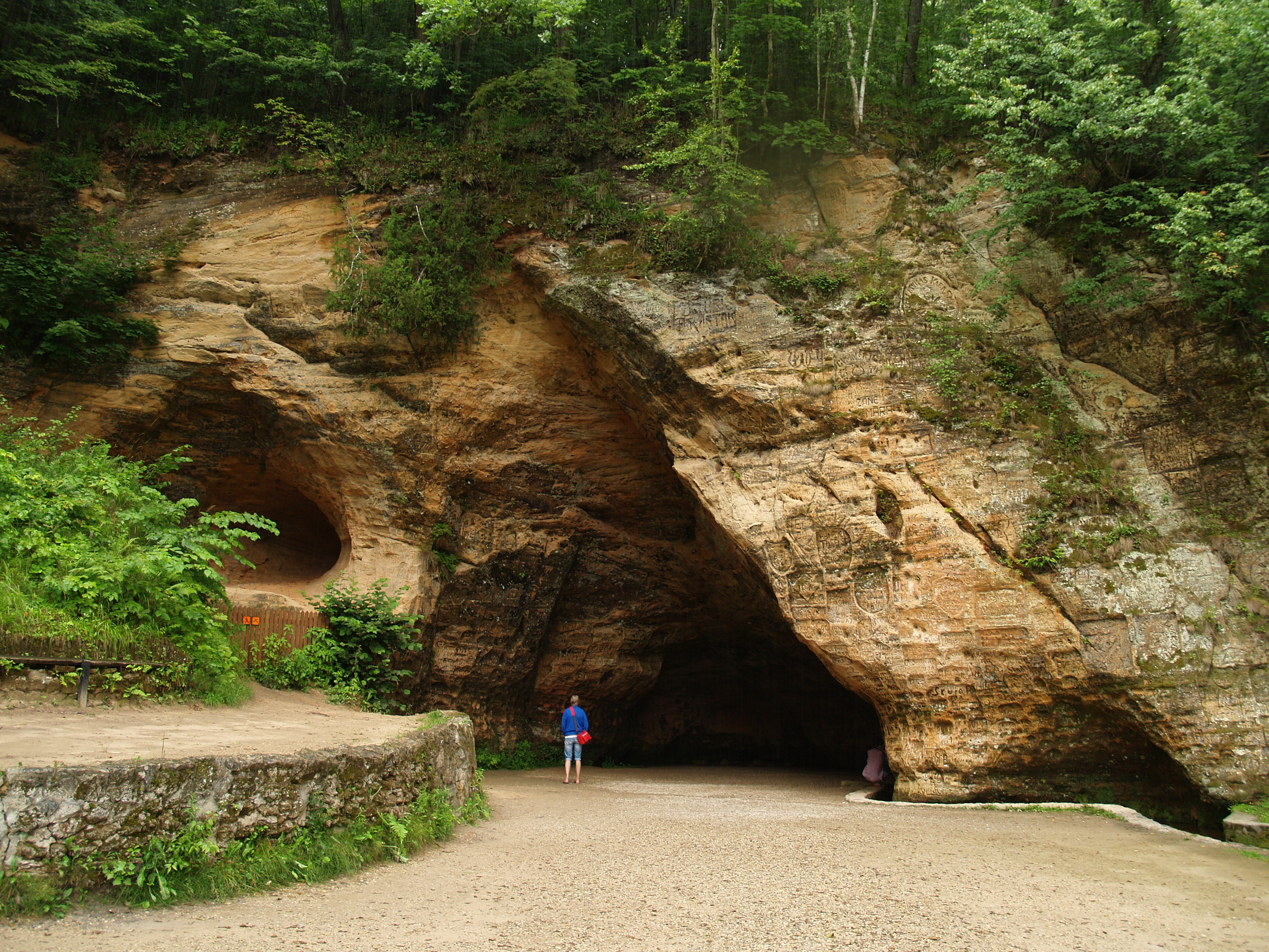 Gutmani koobas Siguldas